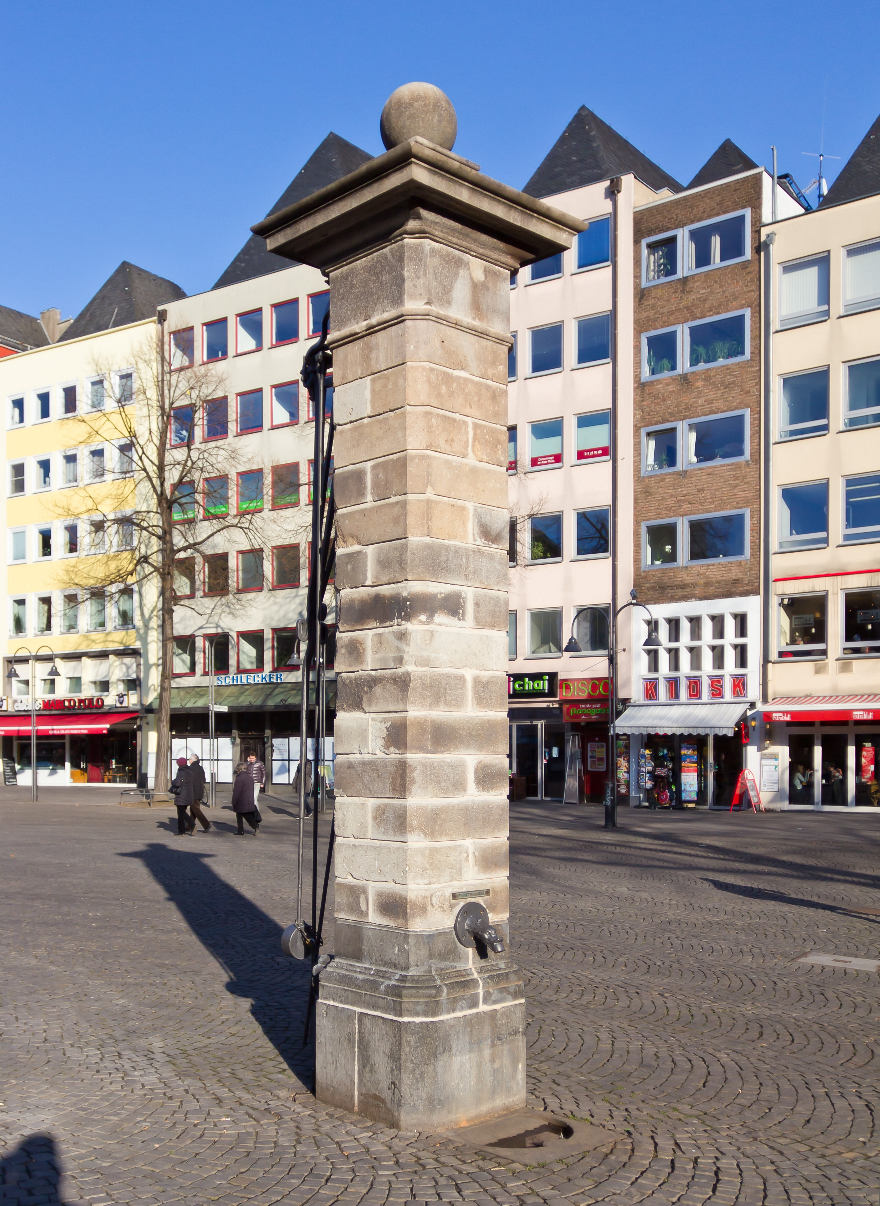 Steinerne Pumpe, Alter Markt, Köln This is a photograph of an architectural monument.